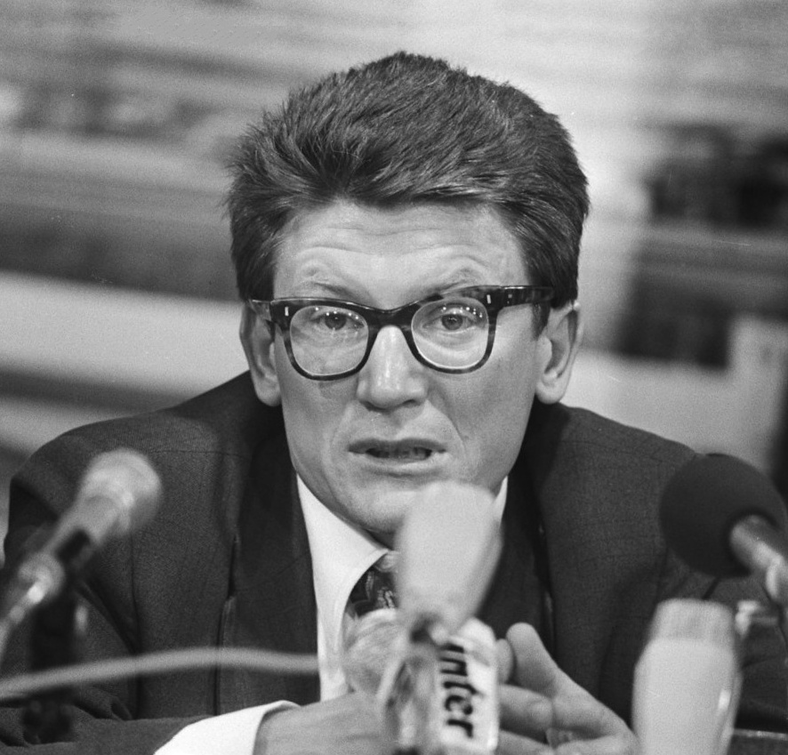 Russische dissident Amalrik en echtgenoot op Schiphol, Almarik alleen kop